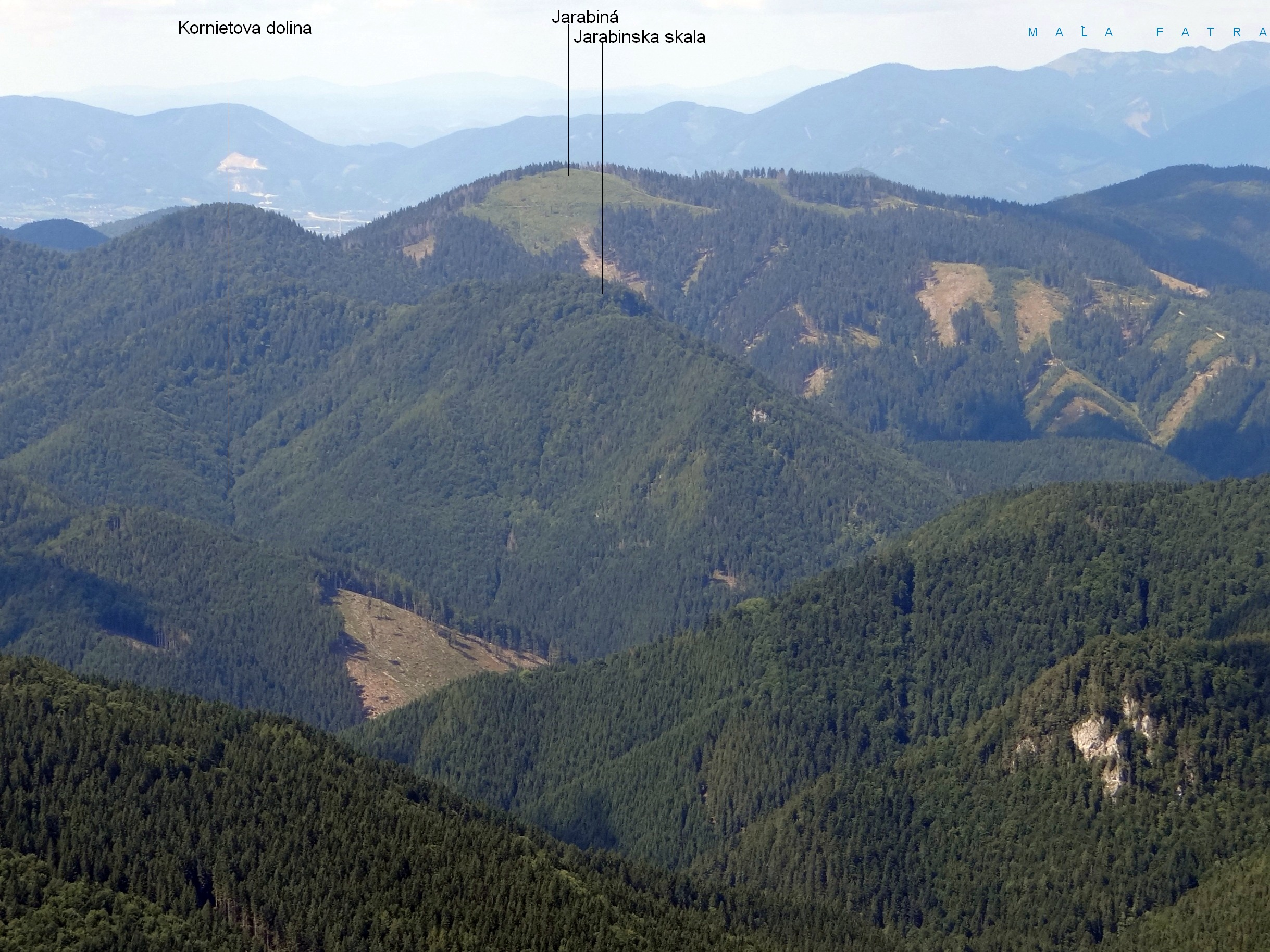 Jarabiná (Veľká Fatra)